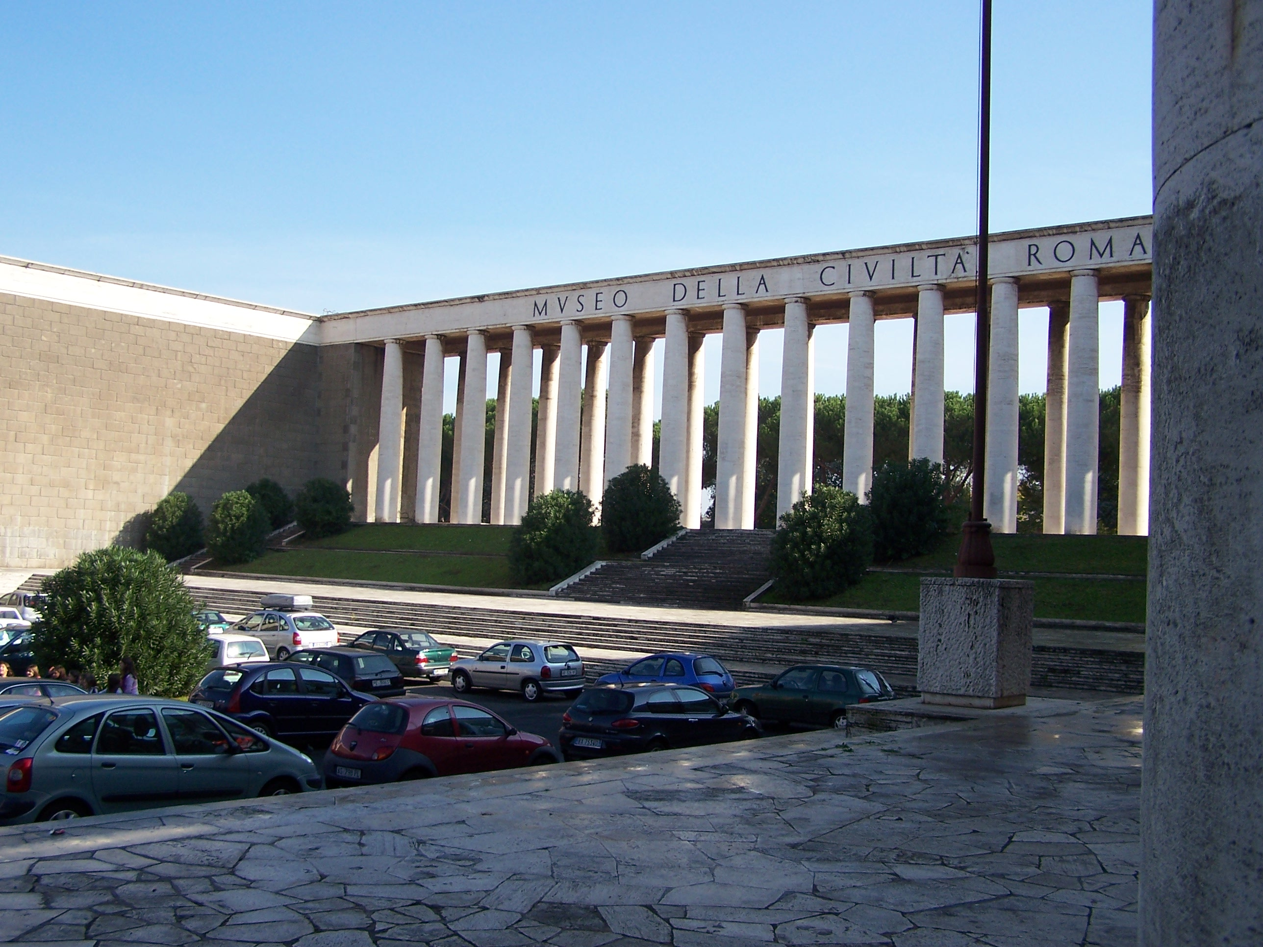 Museo della Civiltà Romana in de EUR, Rome. Eigen werk.